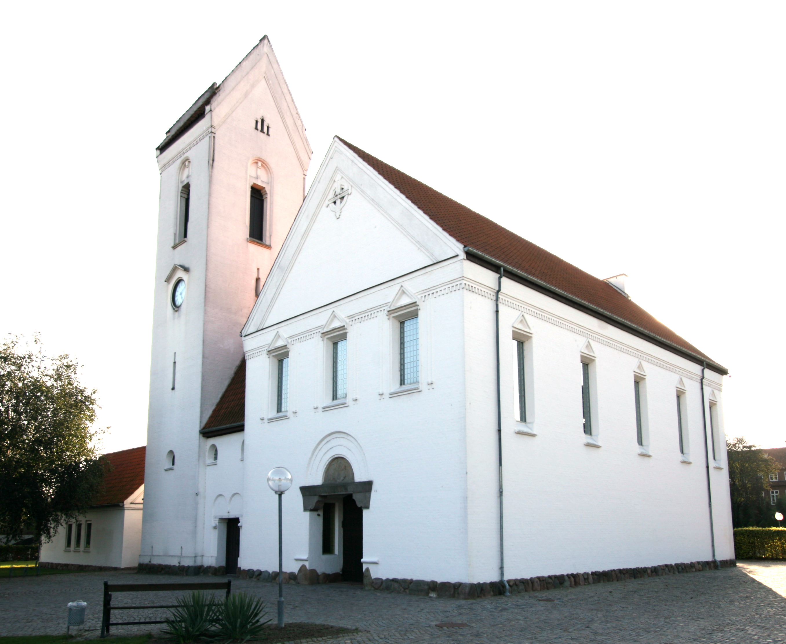 Taastrup Nykirke in Copenhagen County, Denmark Exterior.